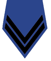 Insignia de rangos militares